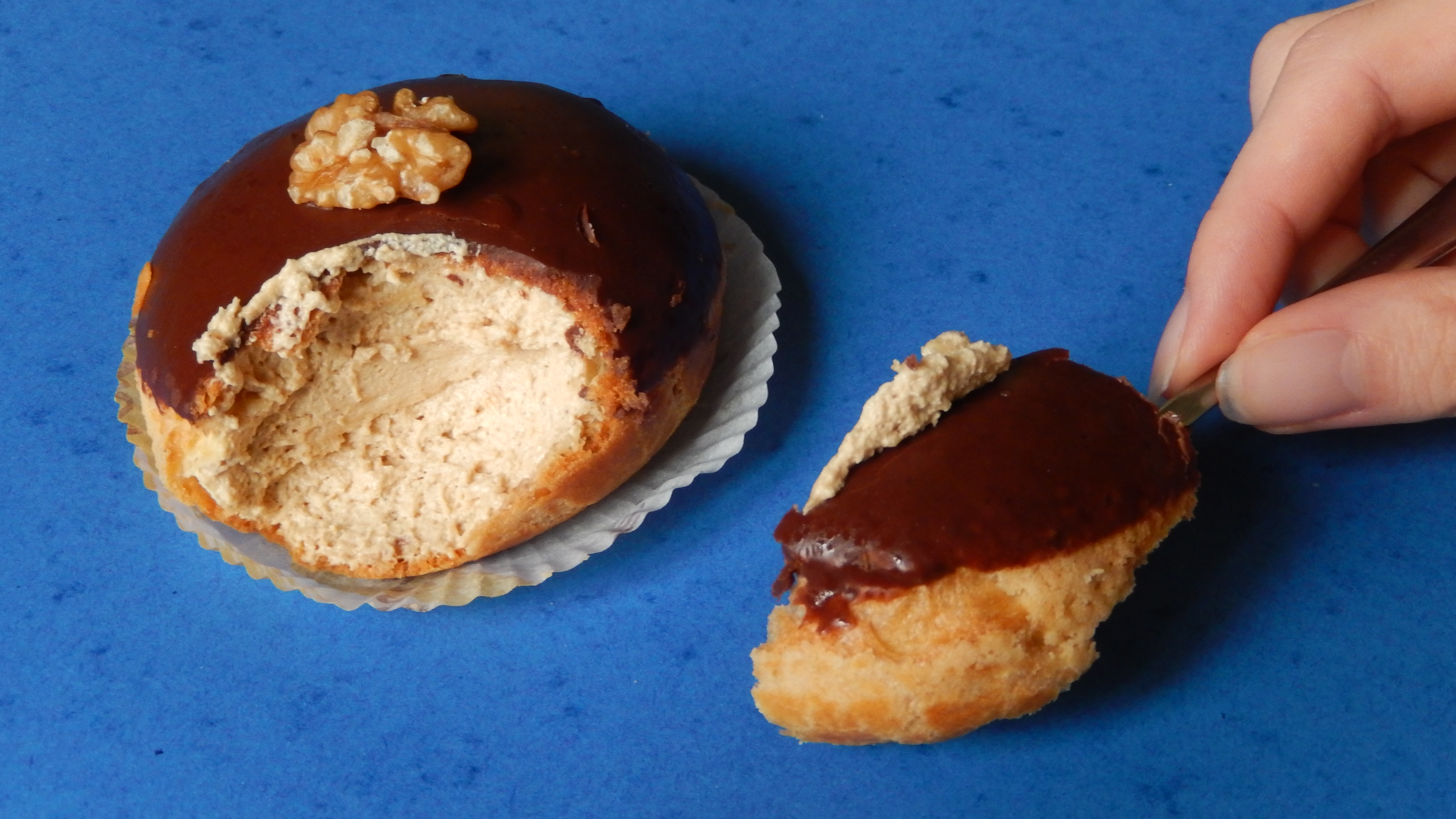 Une « noix charentaise » achetée dans une boulangerie de Cognac.